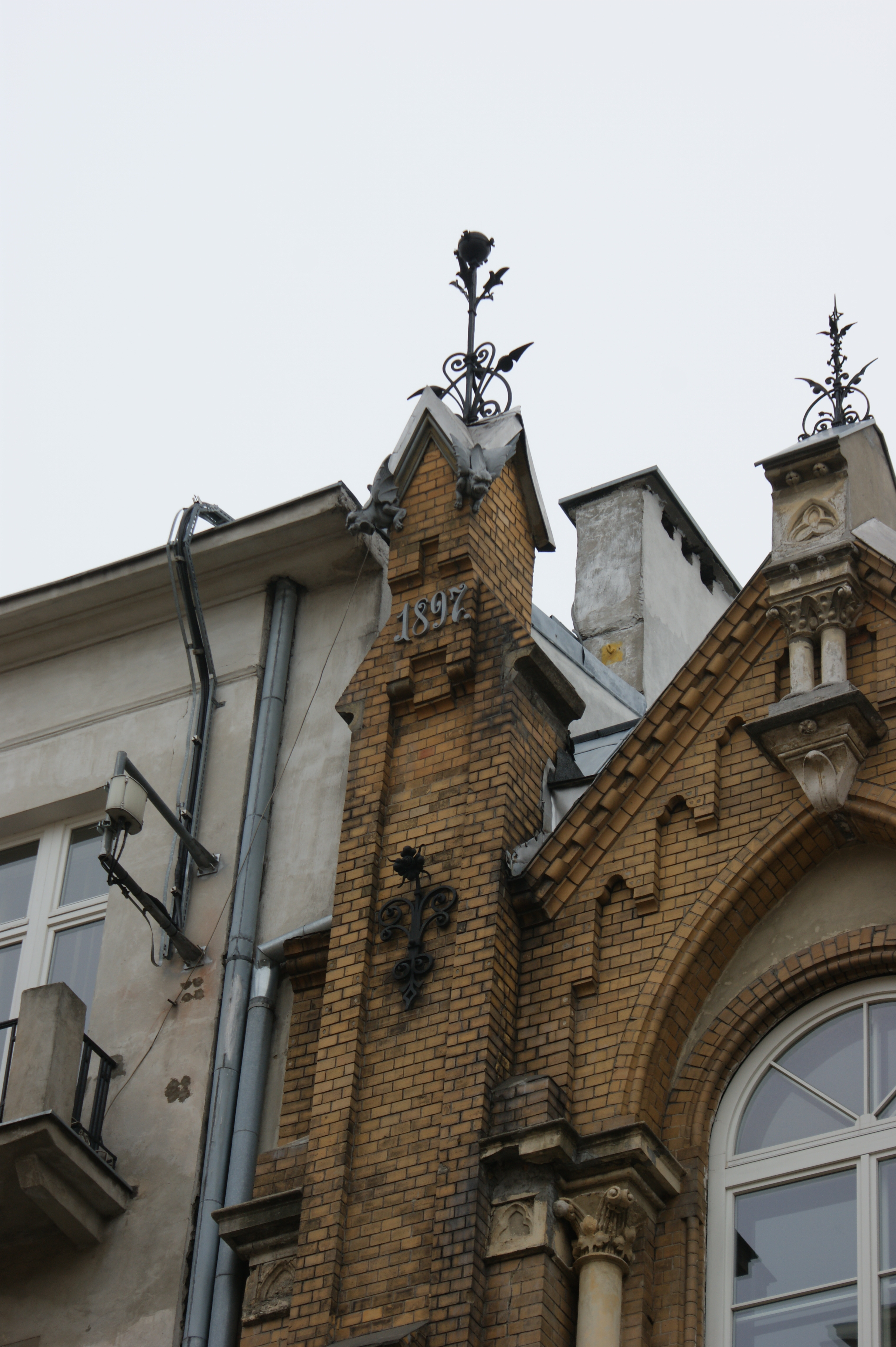 Gmach WTW